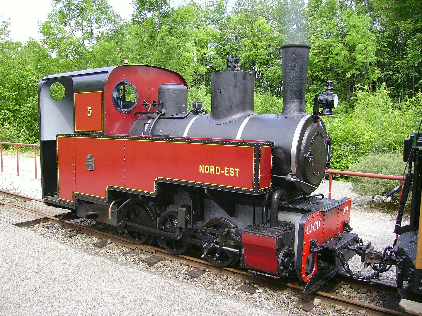 La 030 T N°5 (Decauville N°1652 de 1916) du Chemin de fer Froissy-Cappy-Dompierre le 27 Mai 2007.